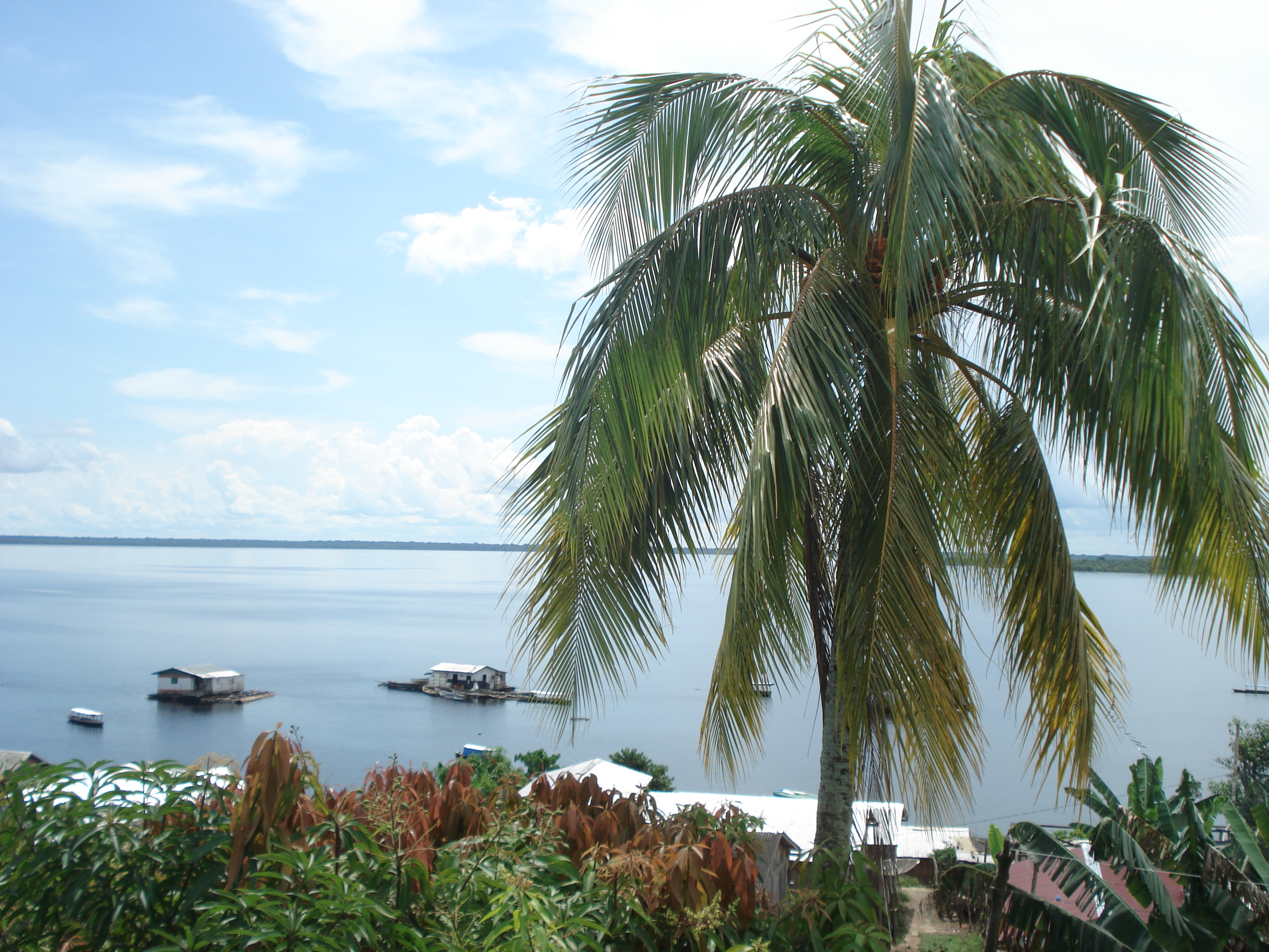 lago tefé